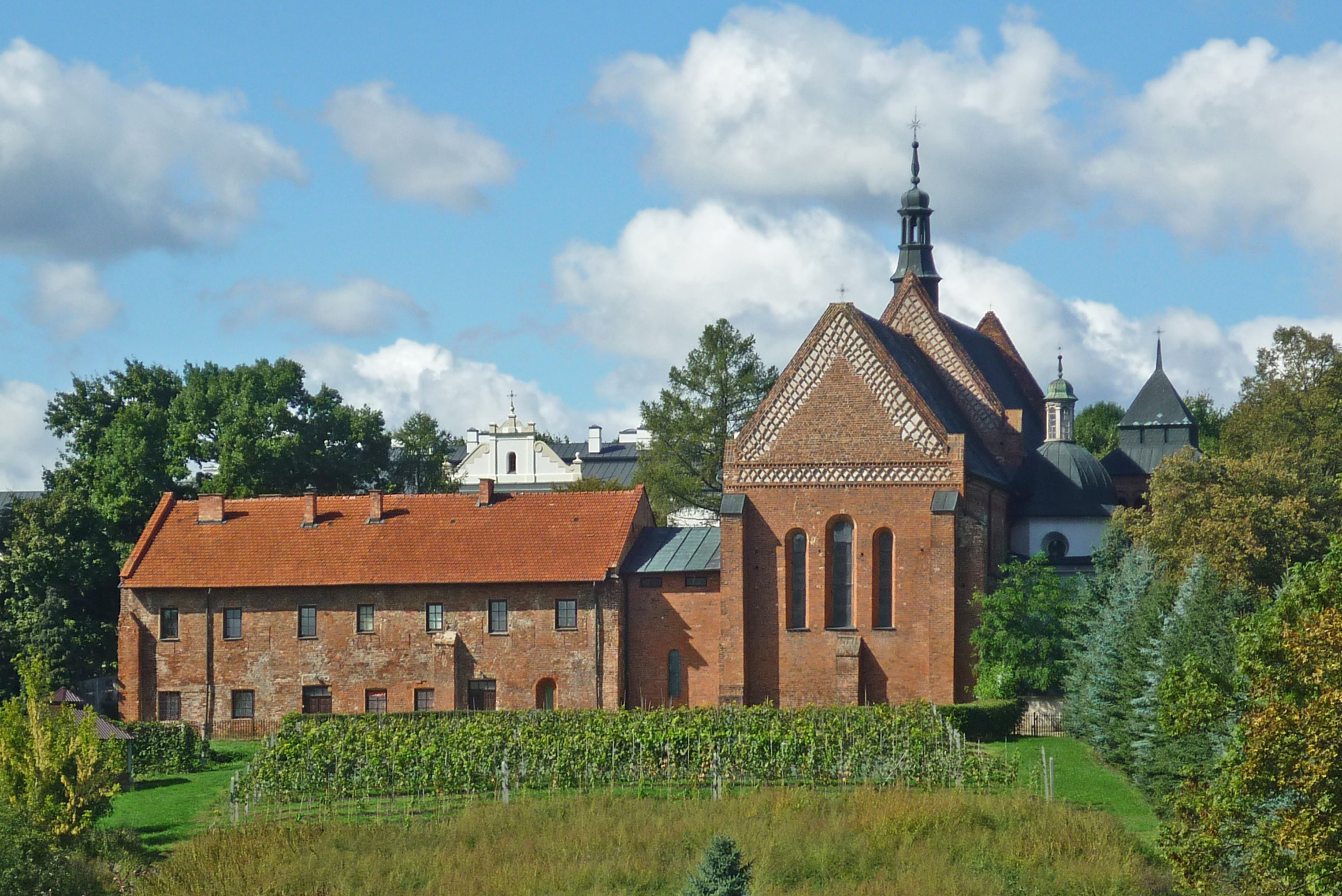 Jakobskirche in Sandomierz